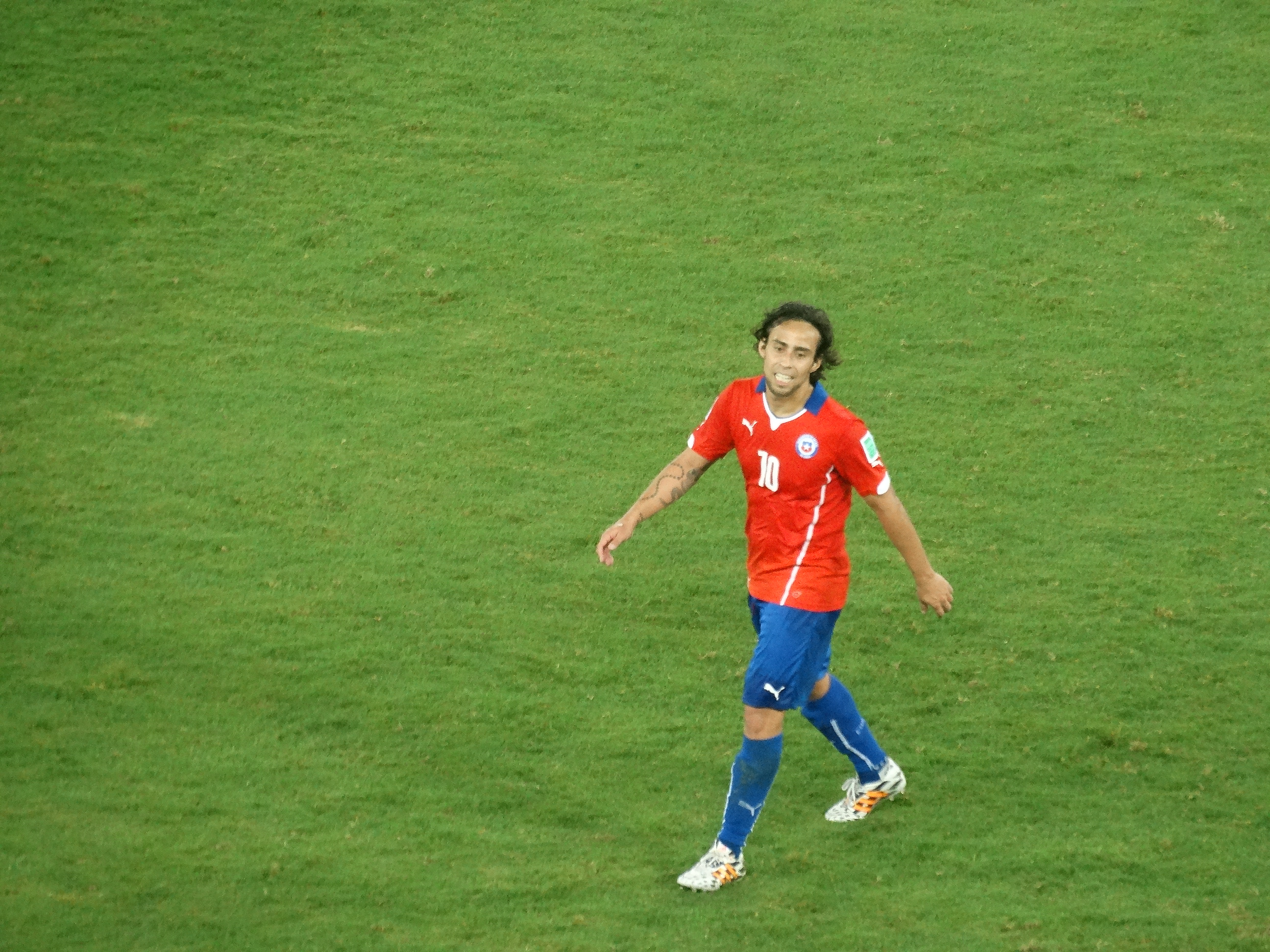 Jorge Valdivia minutos después de anotar un gol ante Australia por la Copa Mundial de Fútbol de 2014